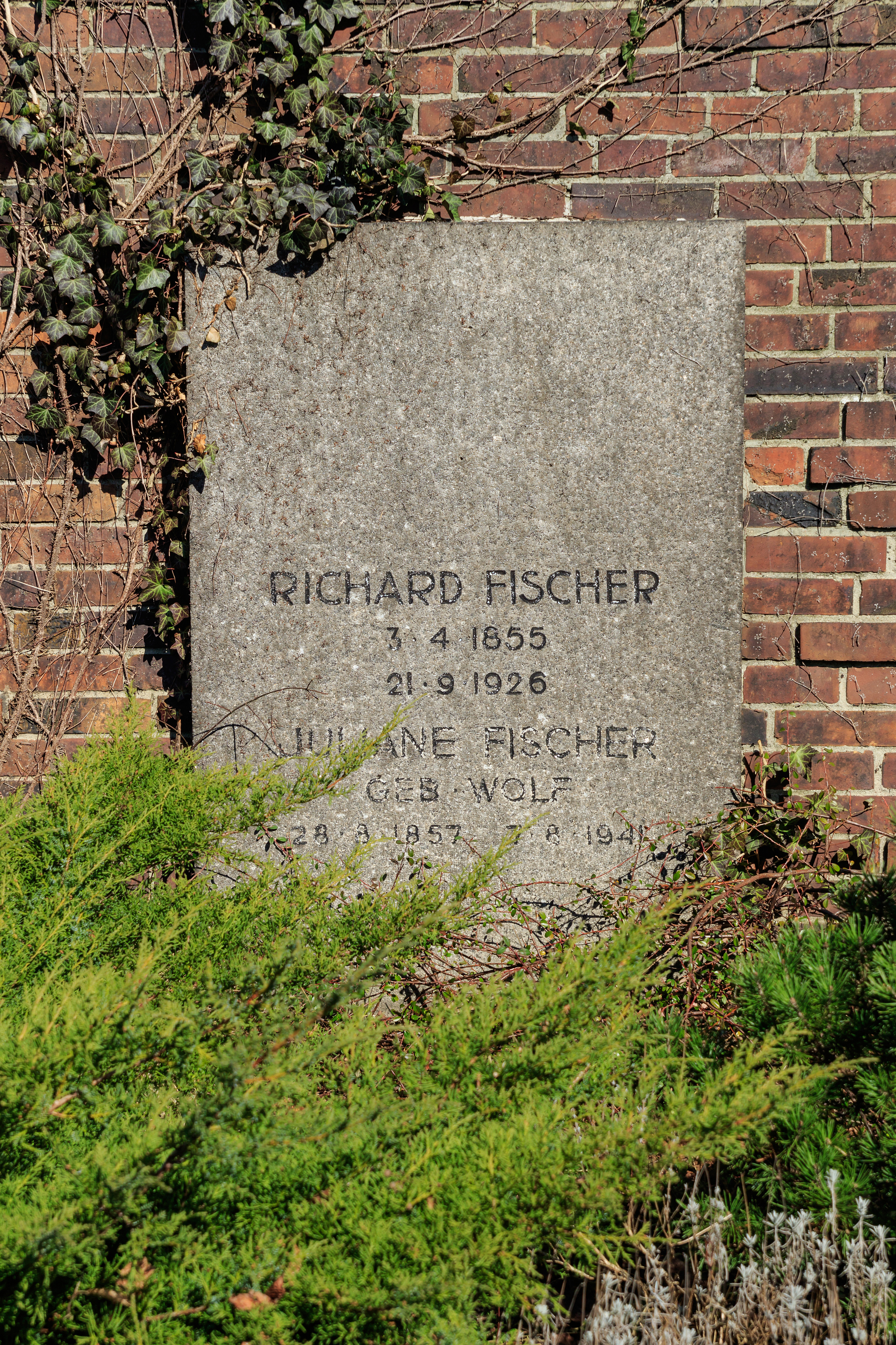 Zentralfriedhof Friedrichsfelde, Berlin-Lichtenberg. Gedenkstätte der Sozialisten, Grab von Richard Fischer.